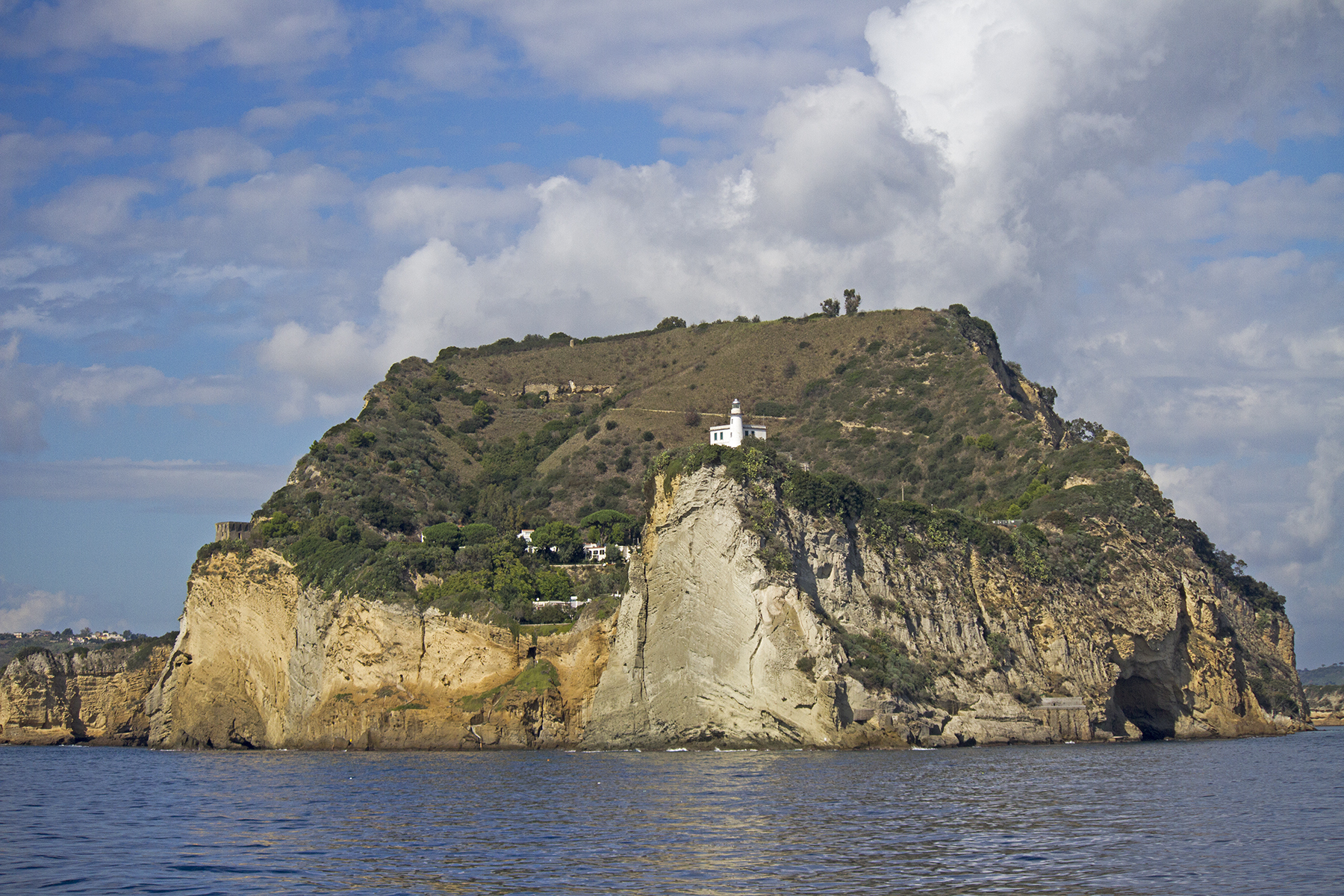 Napoli 3722